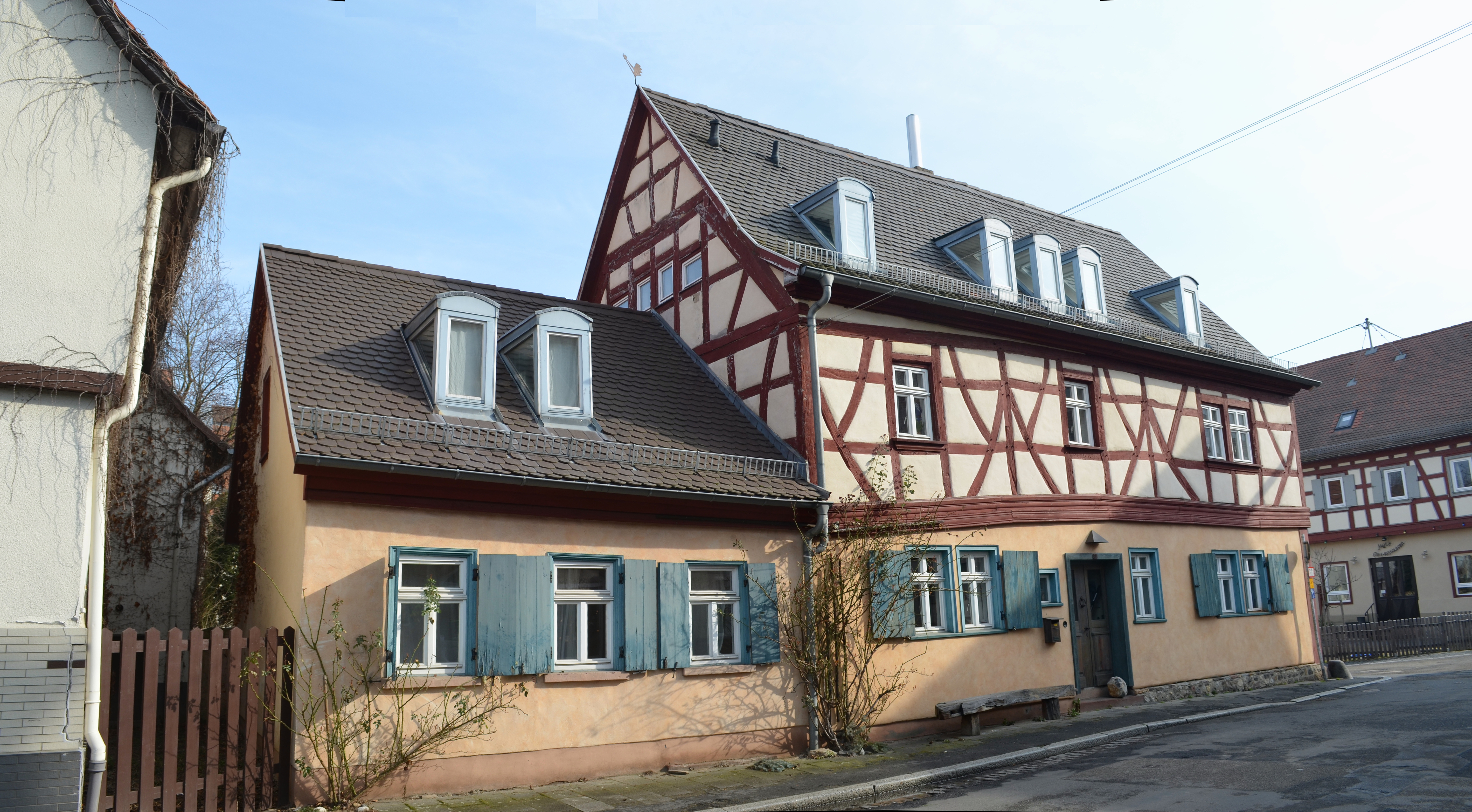 "Solmser Rathaus", Niederursel, Alt-Niederursel 29-31